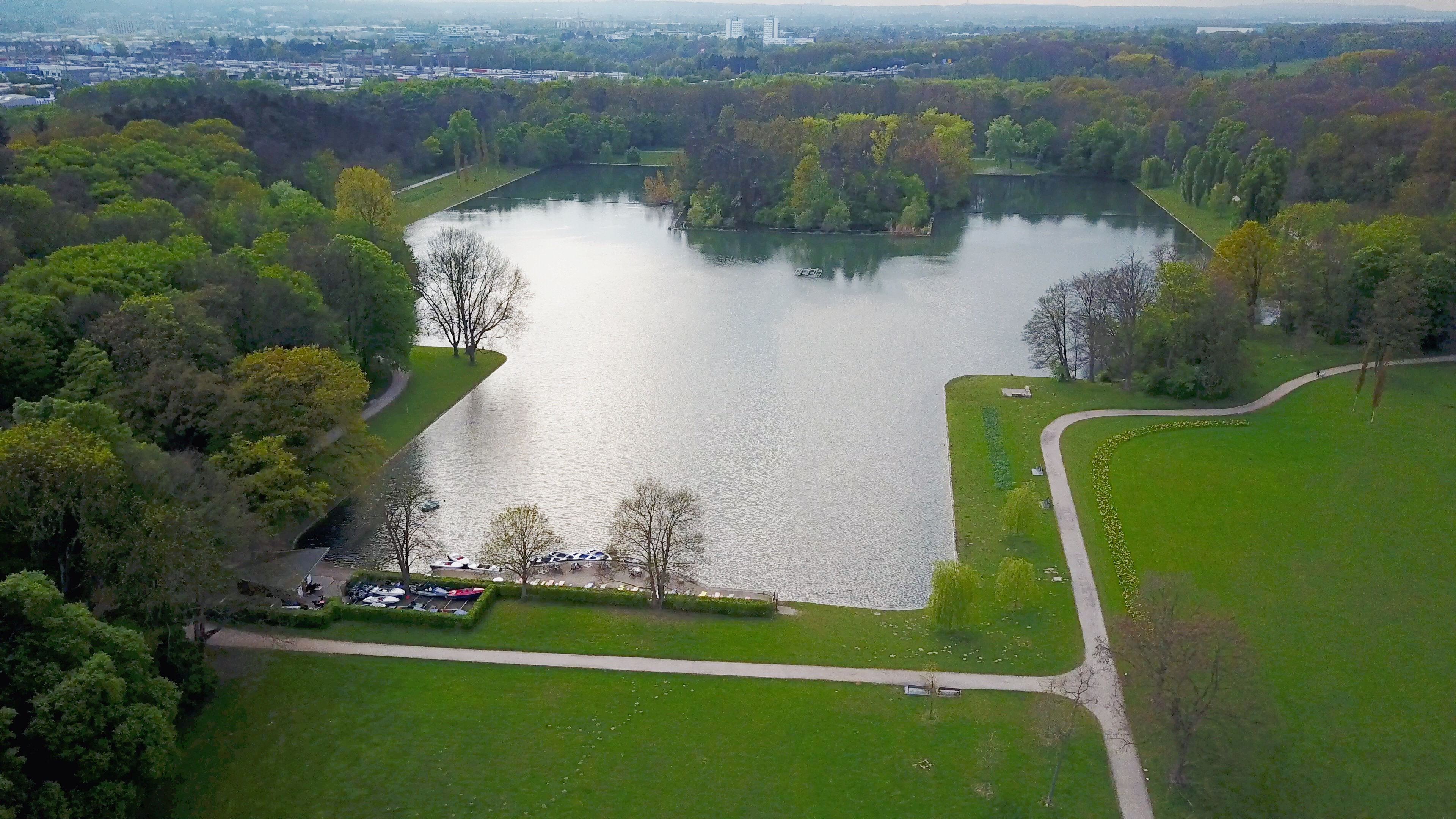 Der Kalscheurer See ist ein beliebtes Erholungsgebiet für Städter und Teil des äußeren Grüngürtels von Köln. Aus etwa 60 Metern Höhe mit einem Quadrocopter von Süden aus aufgenommen.